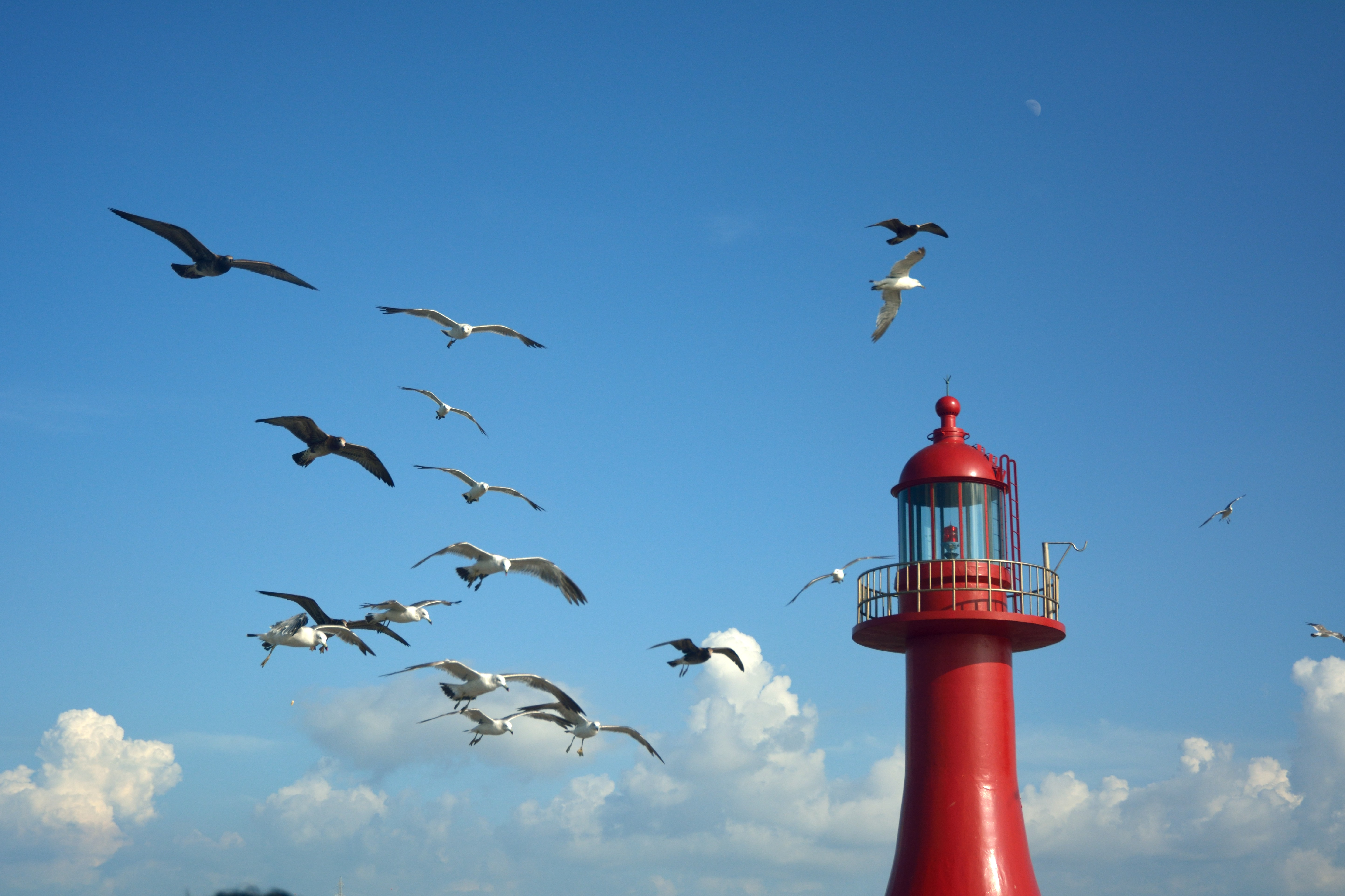 궁평항의 등대.